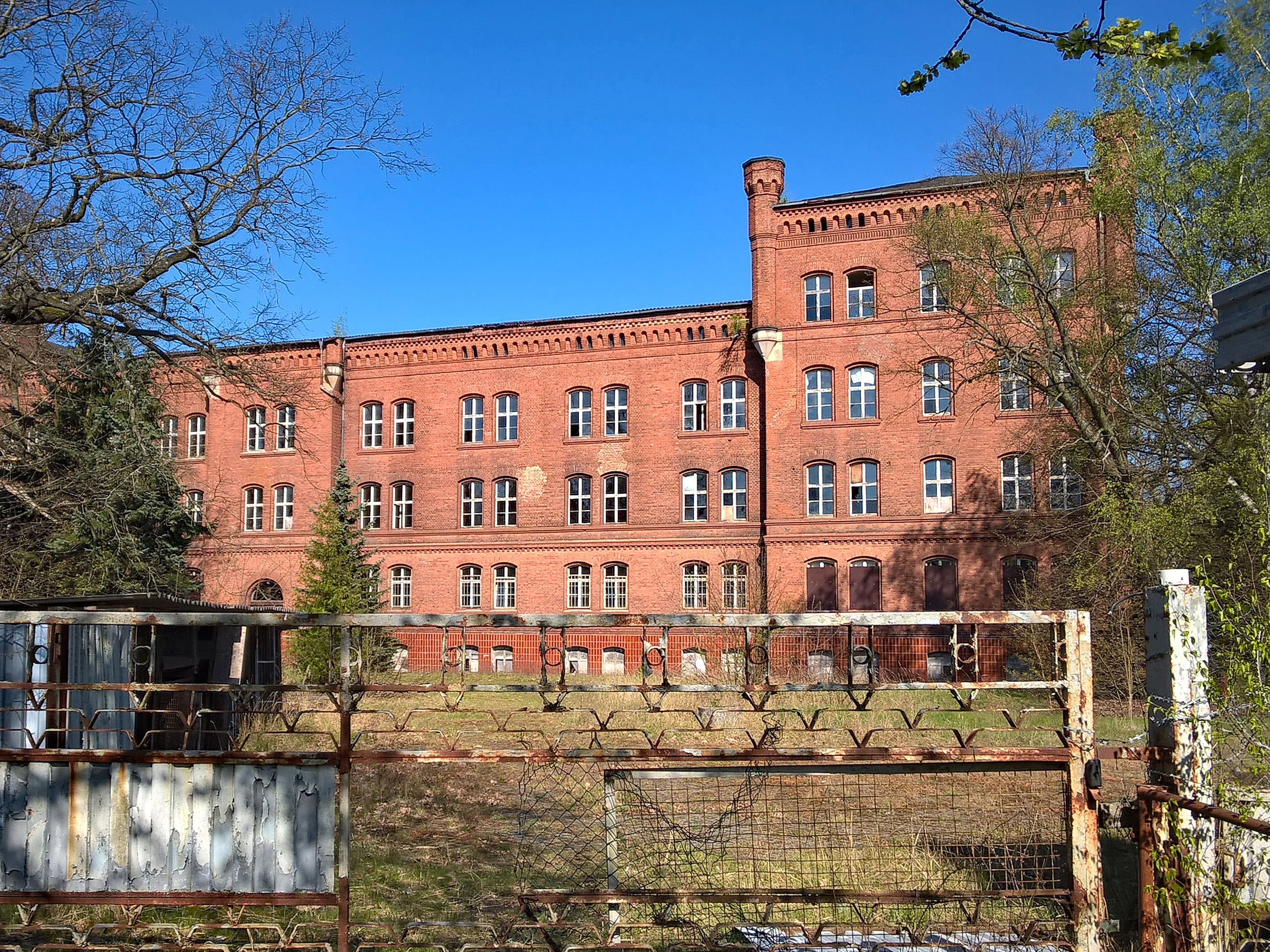 Kaserne auf dem Gelände der Heeresversuchsanstalt Kummersdorf